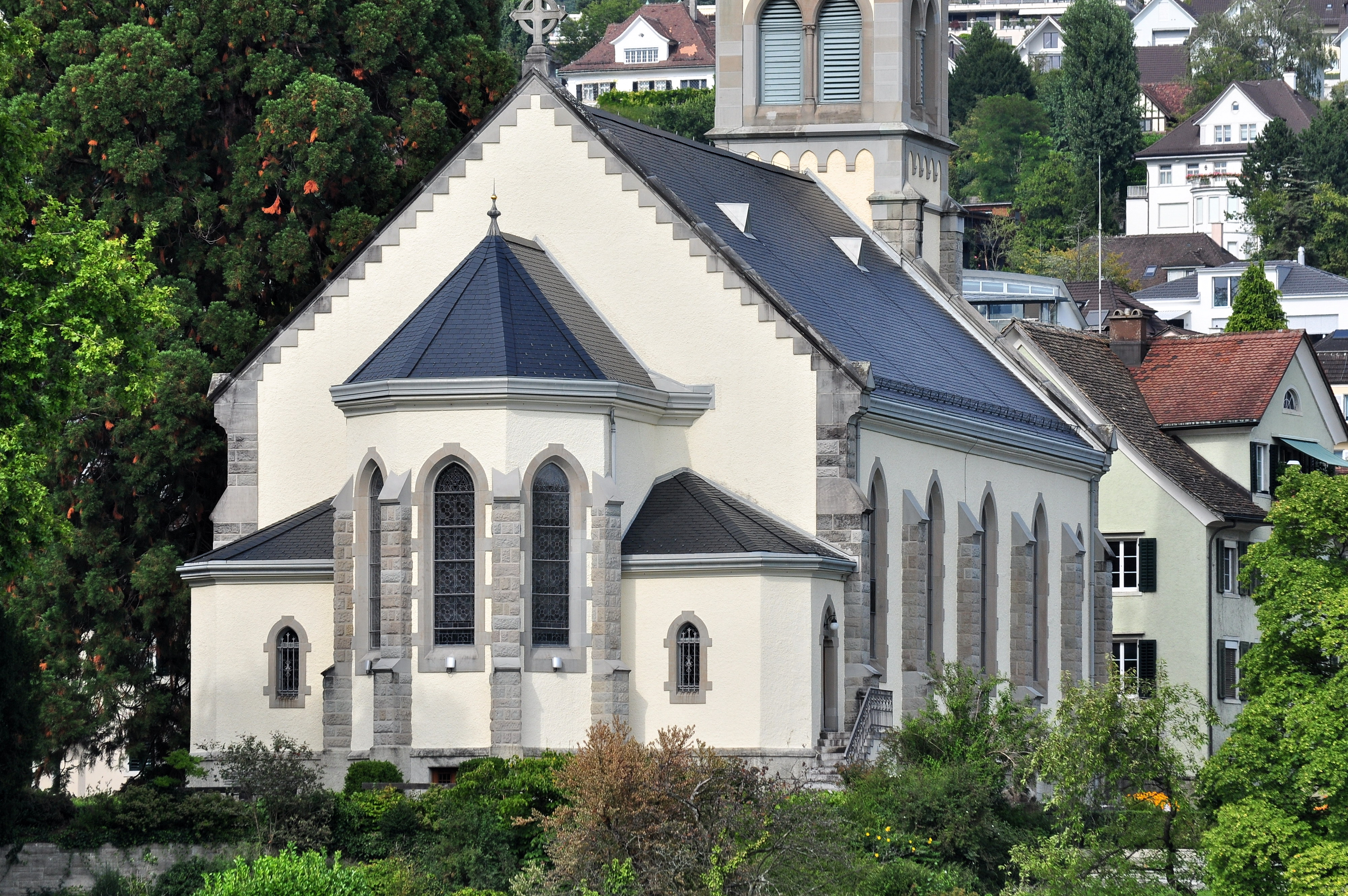 Reformierte Kirche in Erlenbach (Switzerland) as seen from Zürichsee-Schifffahrtsgesellschaft (ZSG) motorship Helvetia